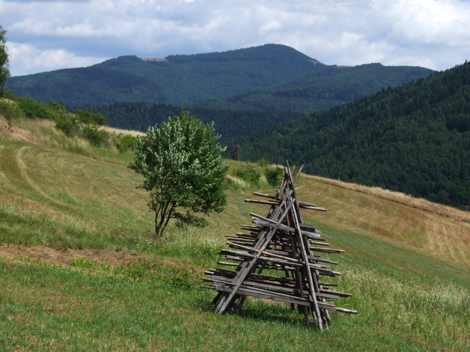 Mogielica - widok z przełęczy pod Kobylicą